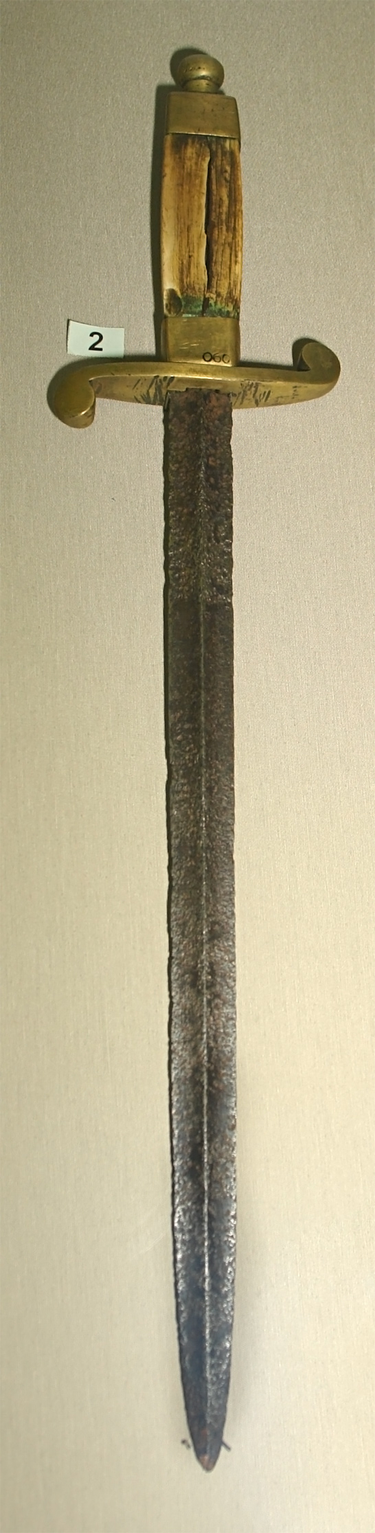 Кортик русский морской офицерский обр. 1803 г периода 1914 - 1917 гг. 19th-century Russian naval officer's dagger.